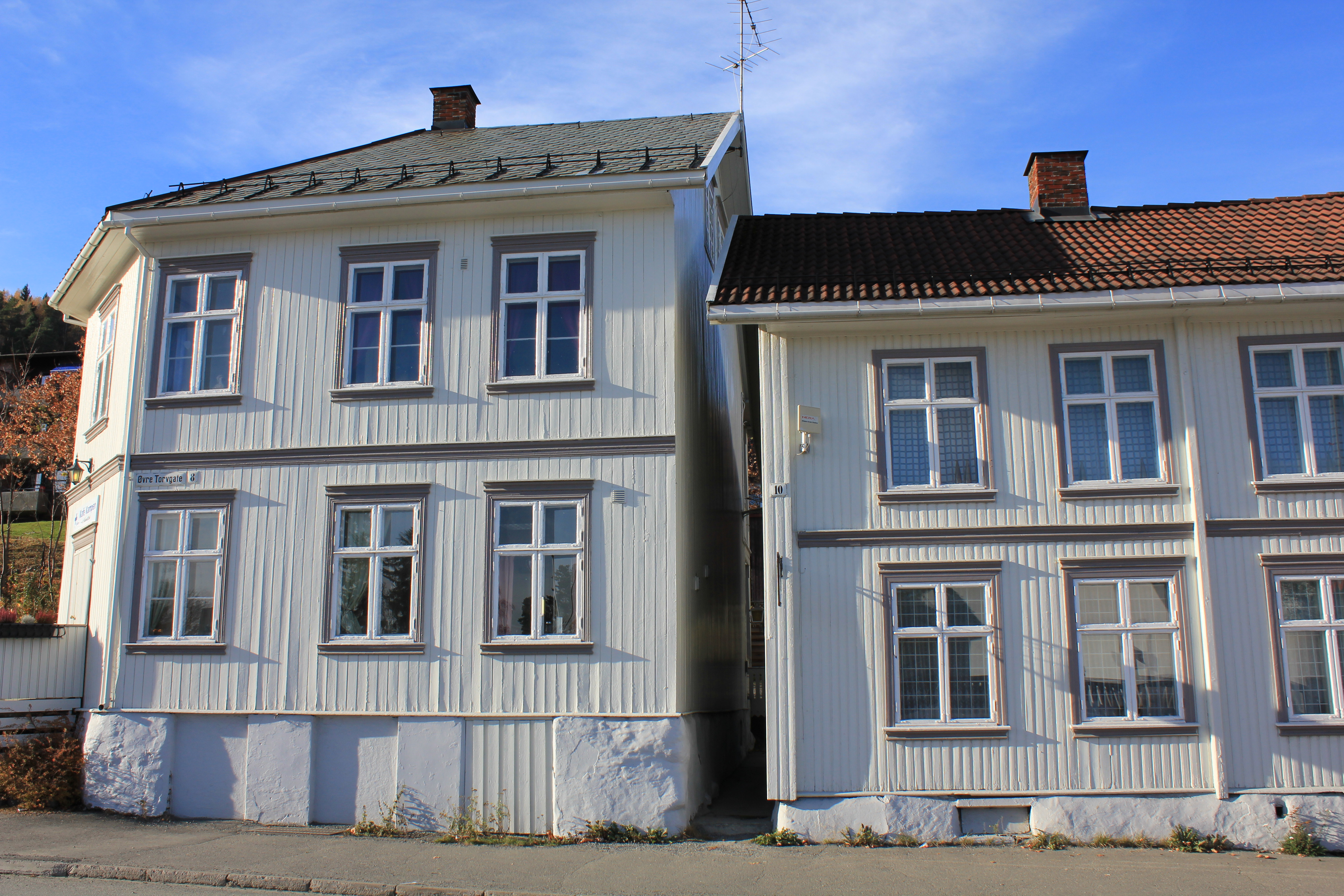 Det er ikke mange igjen av de hvite sjarmerende trehusene som i sin tid gav Gjøvik tilnavnet "Den hvite by ved Mjøsa", men i Øvre Torvgate finner man fremdeles ett og annet eksemplar.